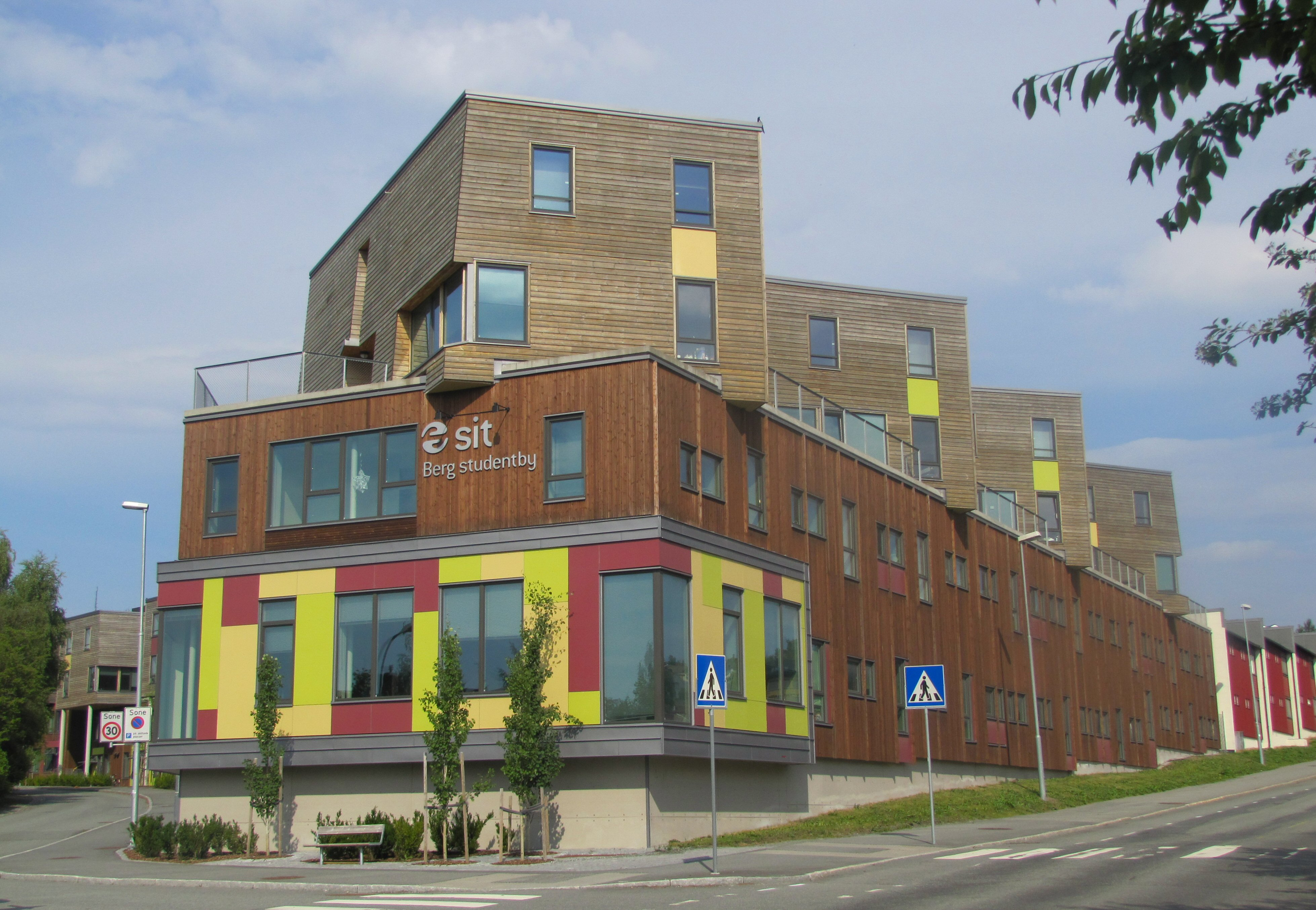 Berg studentby Trondheim